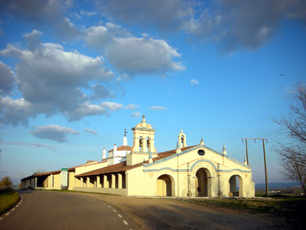 Este es el santuario de la Virgen de Argeme